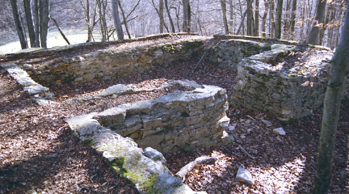 Fundamente des (Wohn-)turmes der Wehranlage Sissacherfluh, Sissach